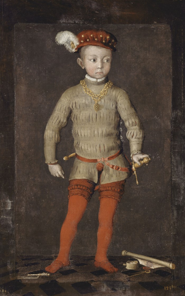 Portrait présumé d'Henri IV enfant, huile sur toile.